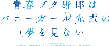 Logo de la serie Seishun Buta Yarou wa Bunny Girl Senpai no Yume wo Minai